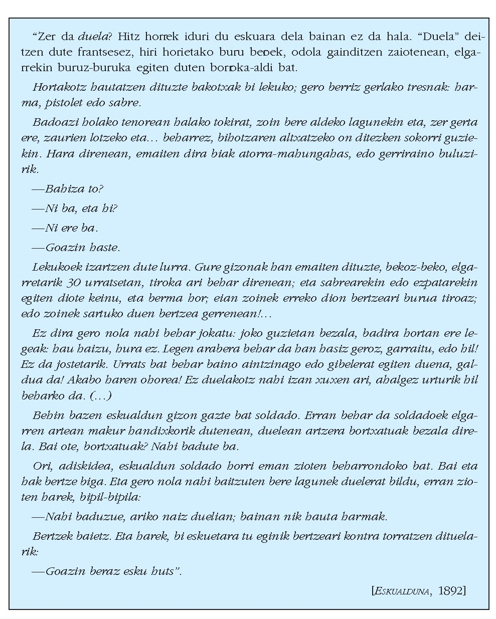 Jean Hiriart Urruty: Euskalduna aldizkarian argitaratutako pasarte bat